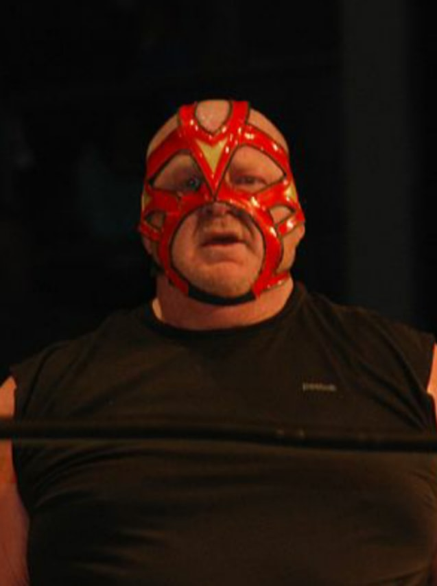 Vader sur un ring de catch en 2014.